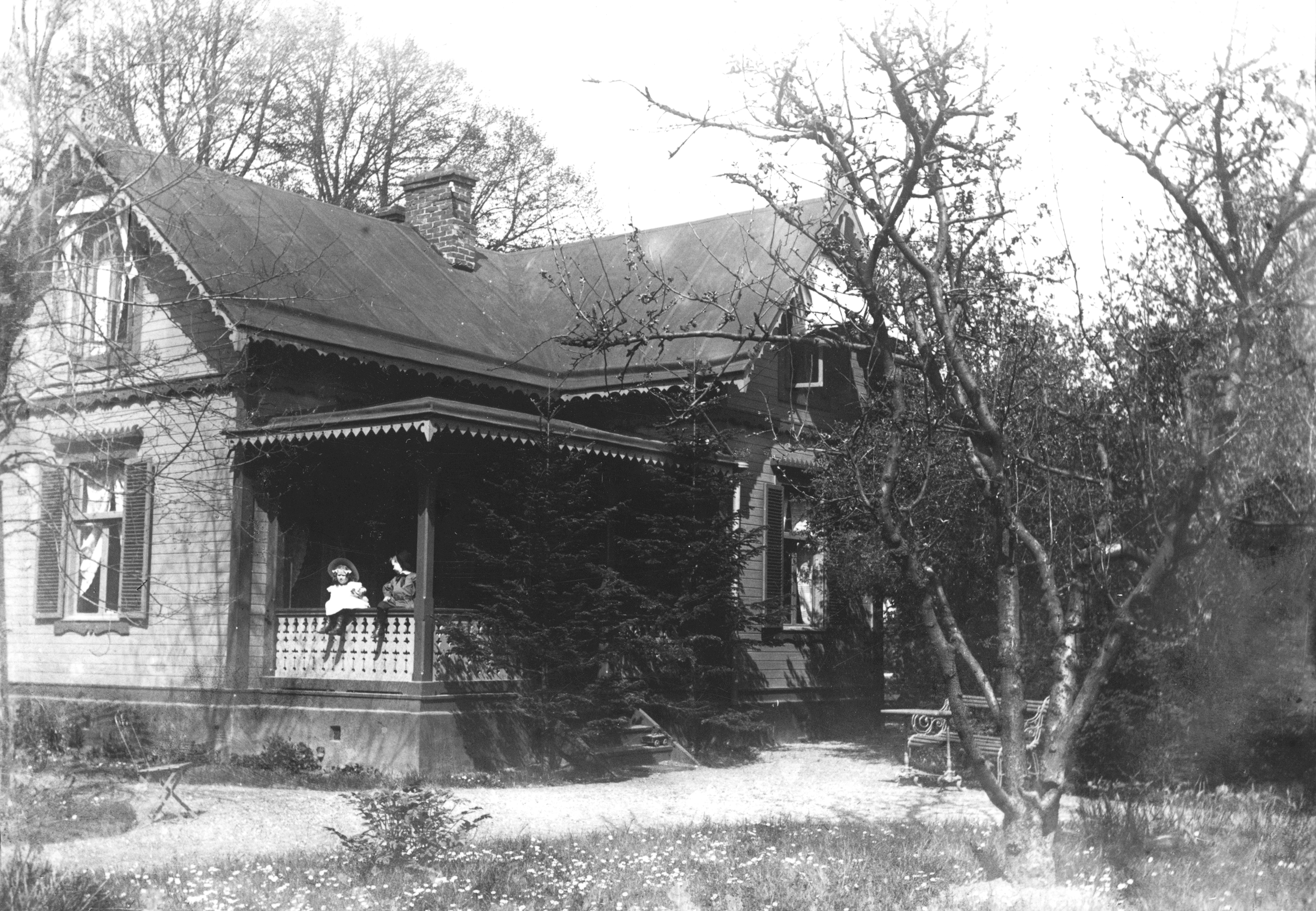 Julius Axel Stenbergs sommarvilla i Rönneholm, Malmö ca 1901. Sven Rosborns släktfotografier.